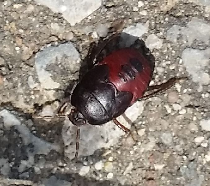 Nymphe der Erdwanze Cydnus aterrimus, am 6.7.2016 in Walldorf/Baden